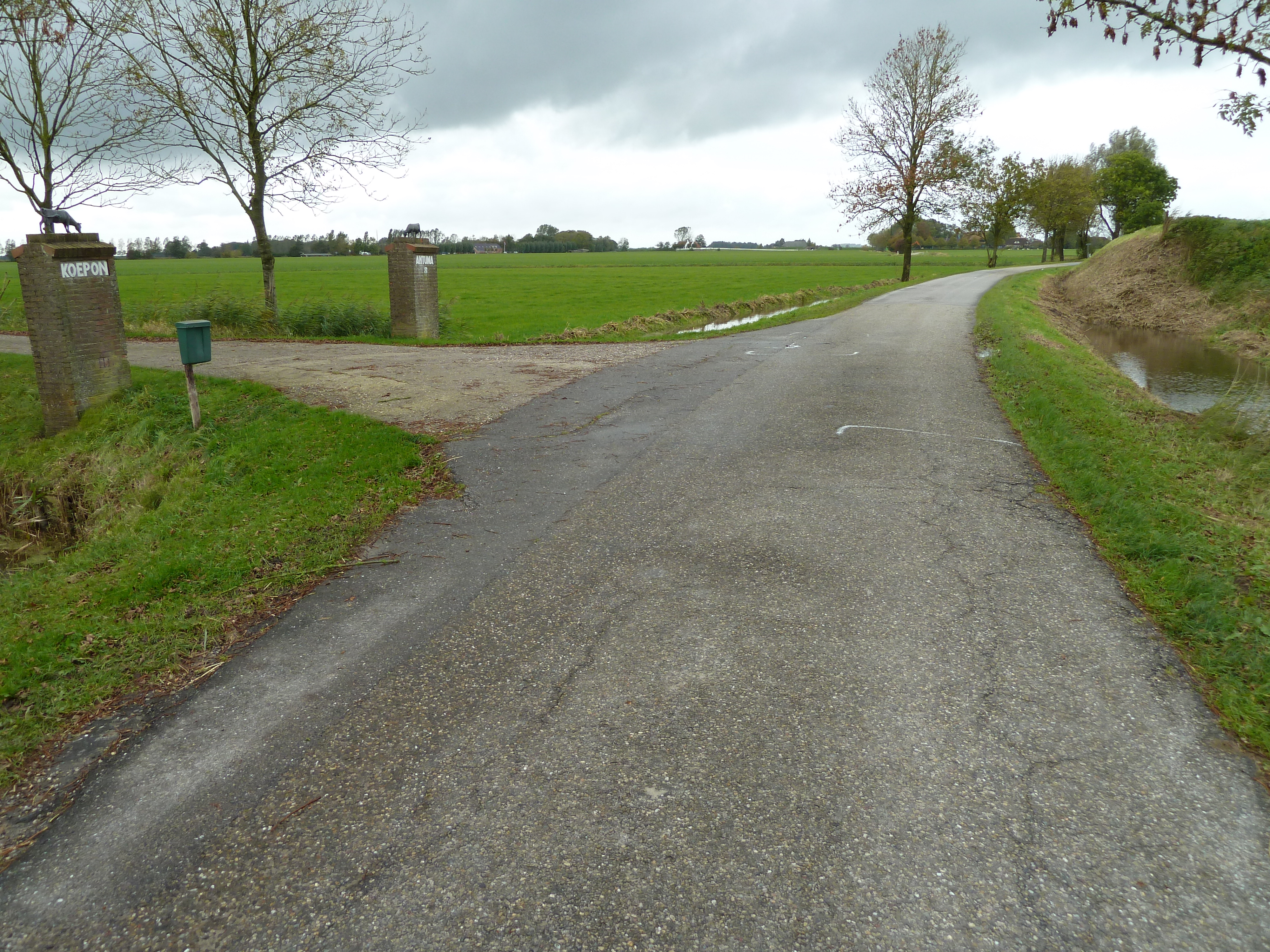 Ingang naar de boerderij Koepon op de voor driekwart afgegraven Groningse wierde Antum. De taartpunt die blijven staan is, is rechts deels zichtbaar